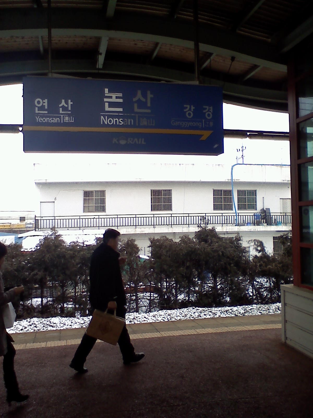 제가 직접 촬영한 사진입니다.